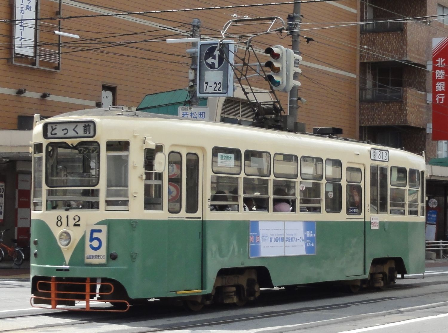 函館市交通局800形電車